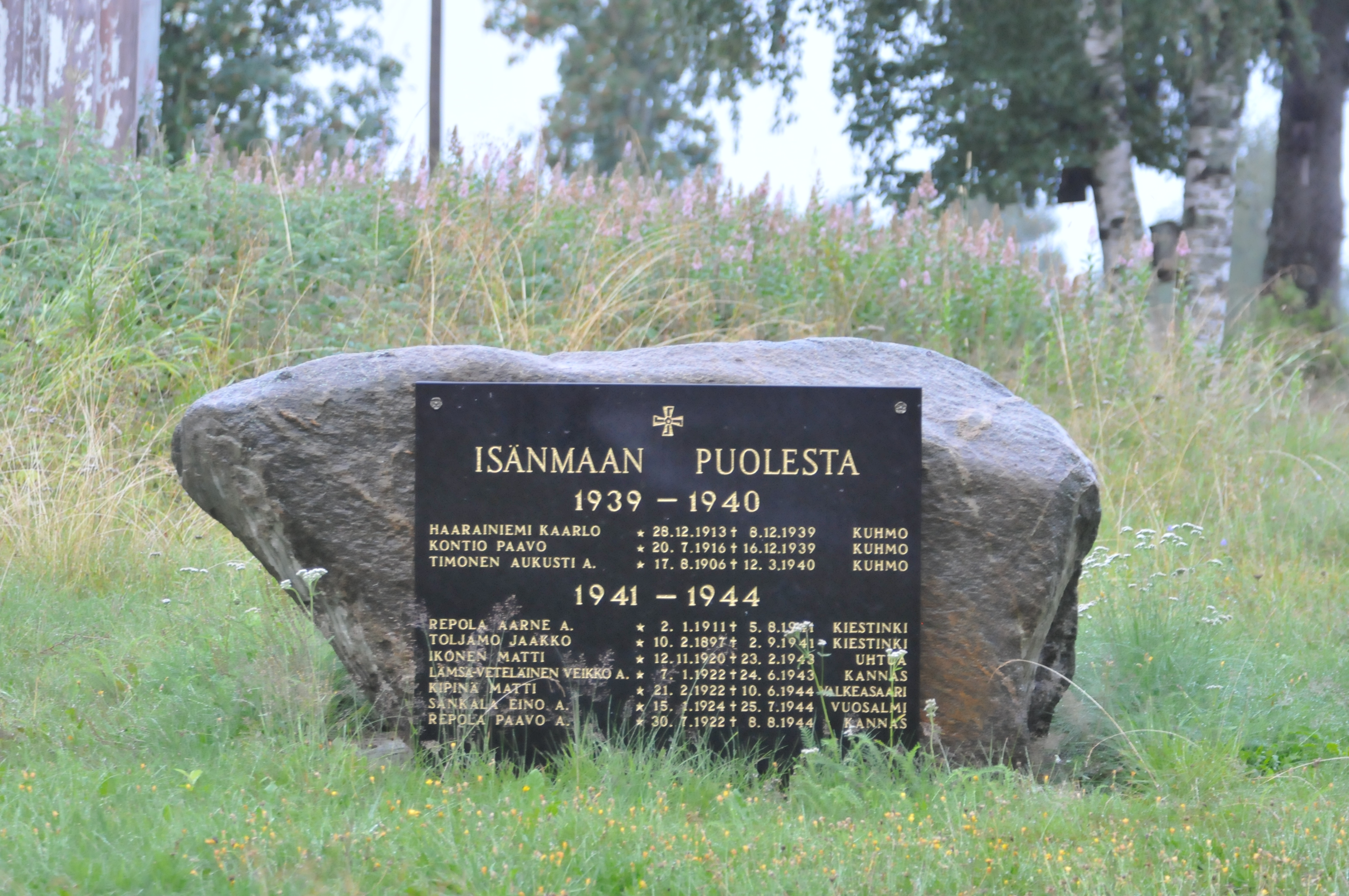 Taipaleenharjun koulupiirin sankarivainajat